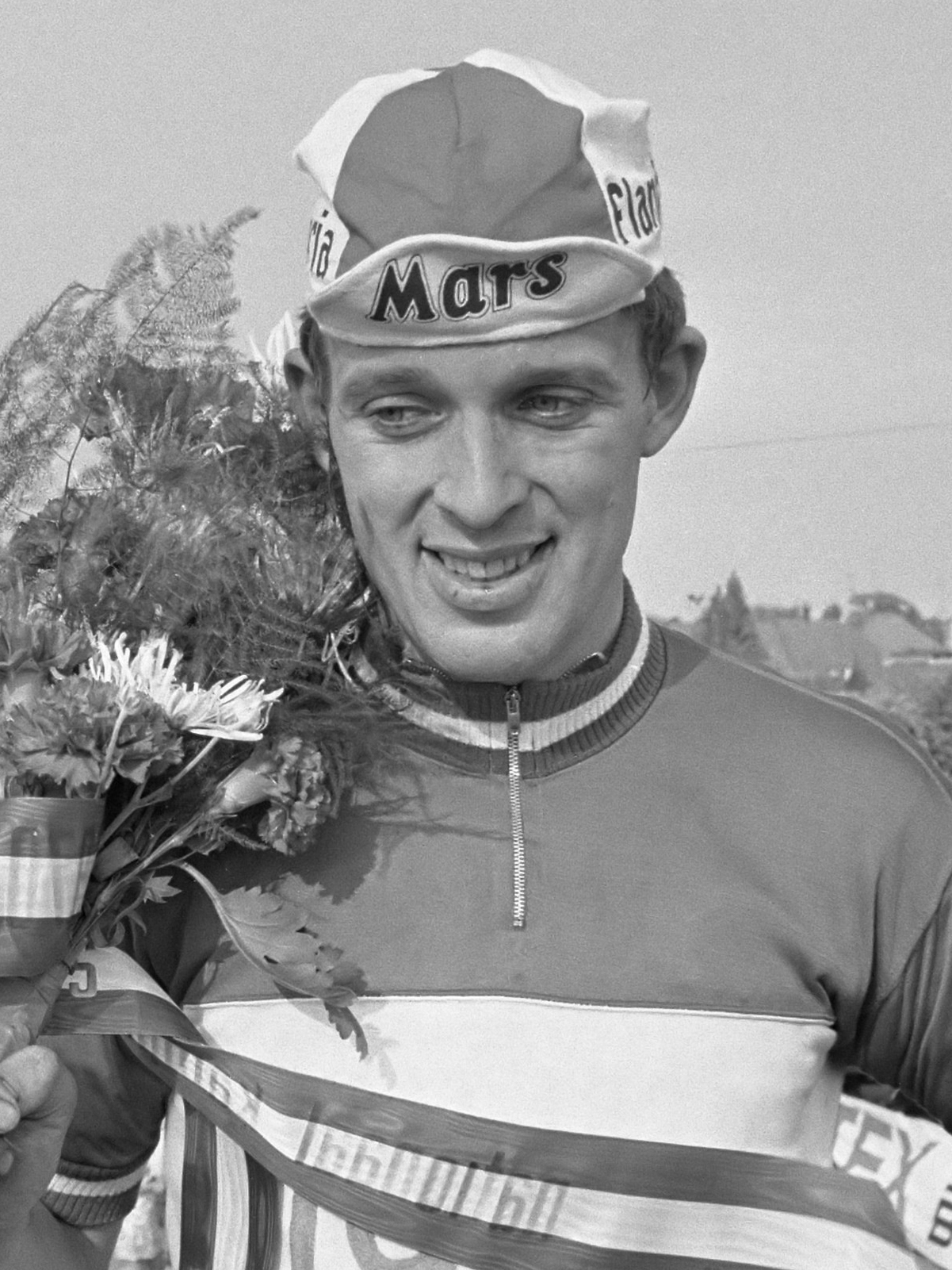 Wielerkampioenschappen op de weg voor amateurs te Helmond kampioen C. Koeken in bloemen